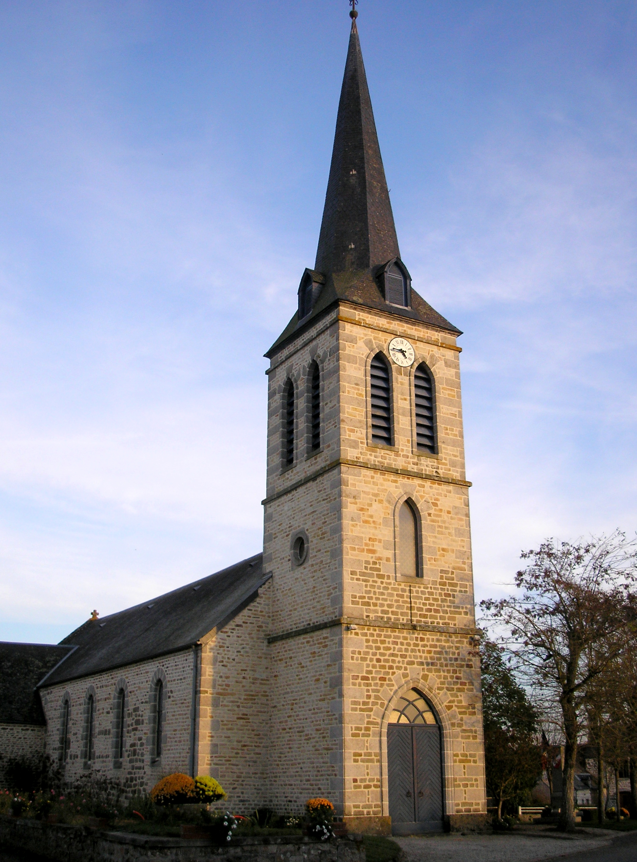 Saint-Patrice-du-Désert (Normandie, France). L'église Saint-Patrice.